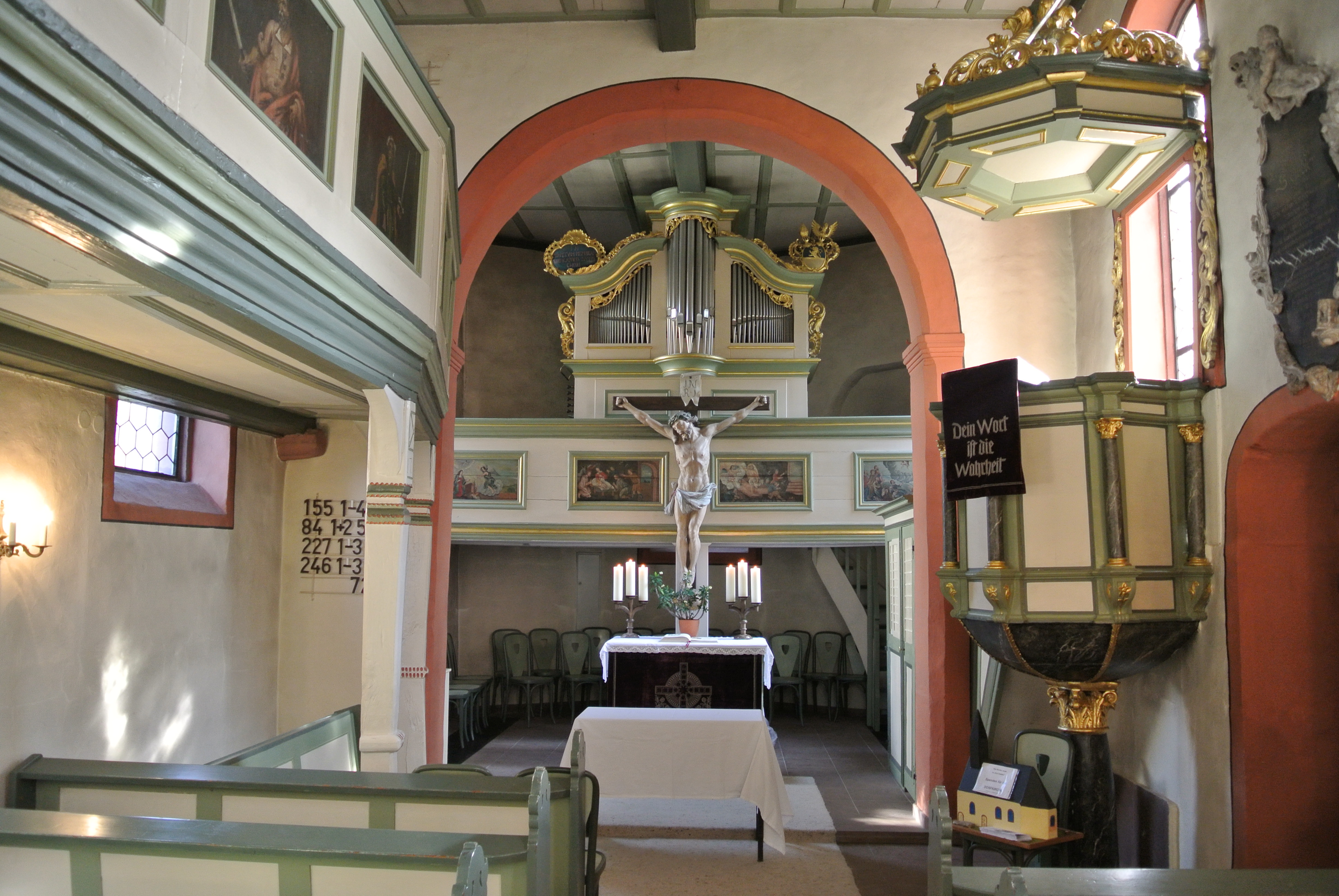 Evangelische Dorfkirche in Frankfurt-Unterliederbach, Heugasse 1; Bauzeit 12. Jahrhundert, 1716; barocke Saalkirche von Daniel Keyser; Baudenkmal; Chorbogen, Altar, Kanzel und Orgel